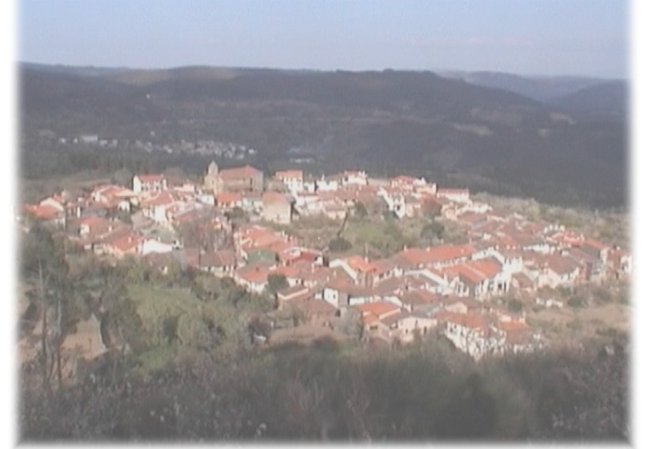 Foto del pueblo Villanueva del conde